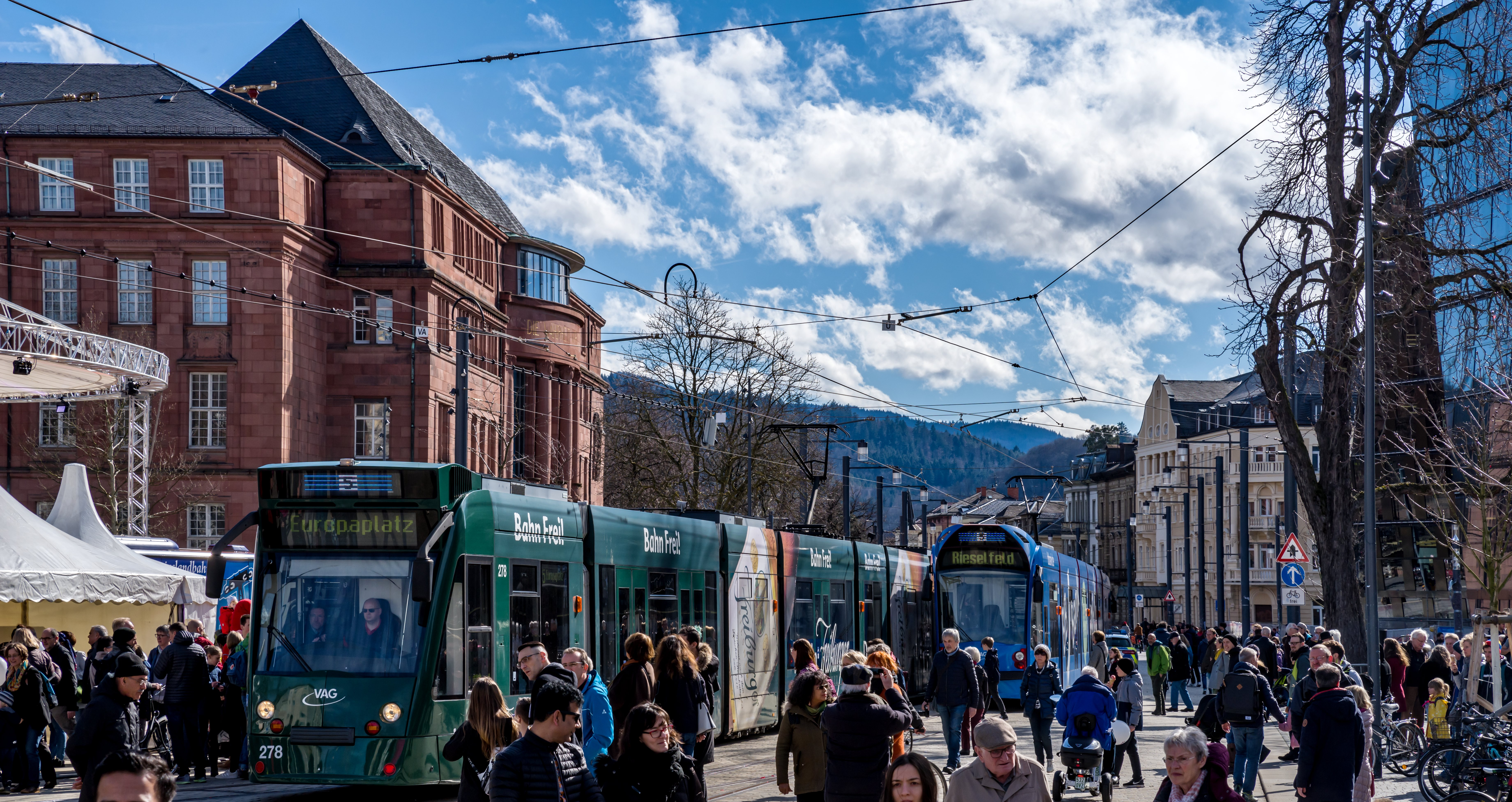 Bilder aus Freiburg vom 16. März 2019. Anlaß: Eröffnung der Linie 5 der VAG beim Platz der alten Synagoge.